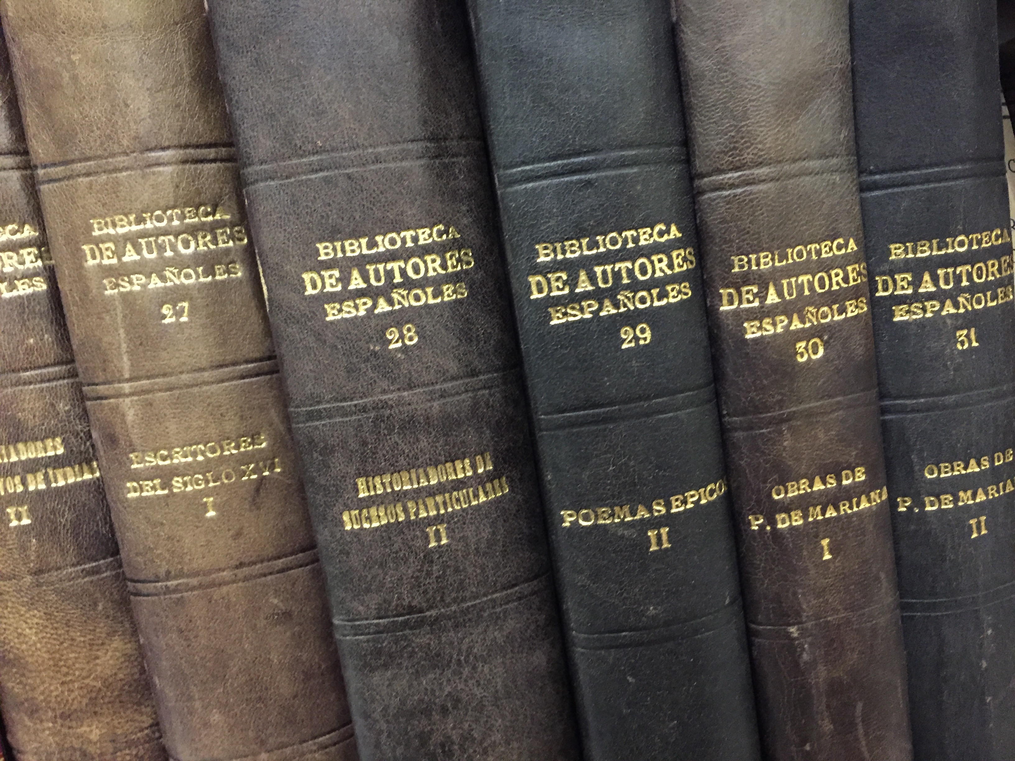 Biblioteca de Facultat de Geografia i història de la UB 3